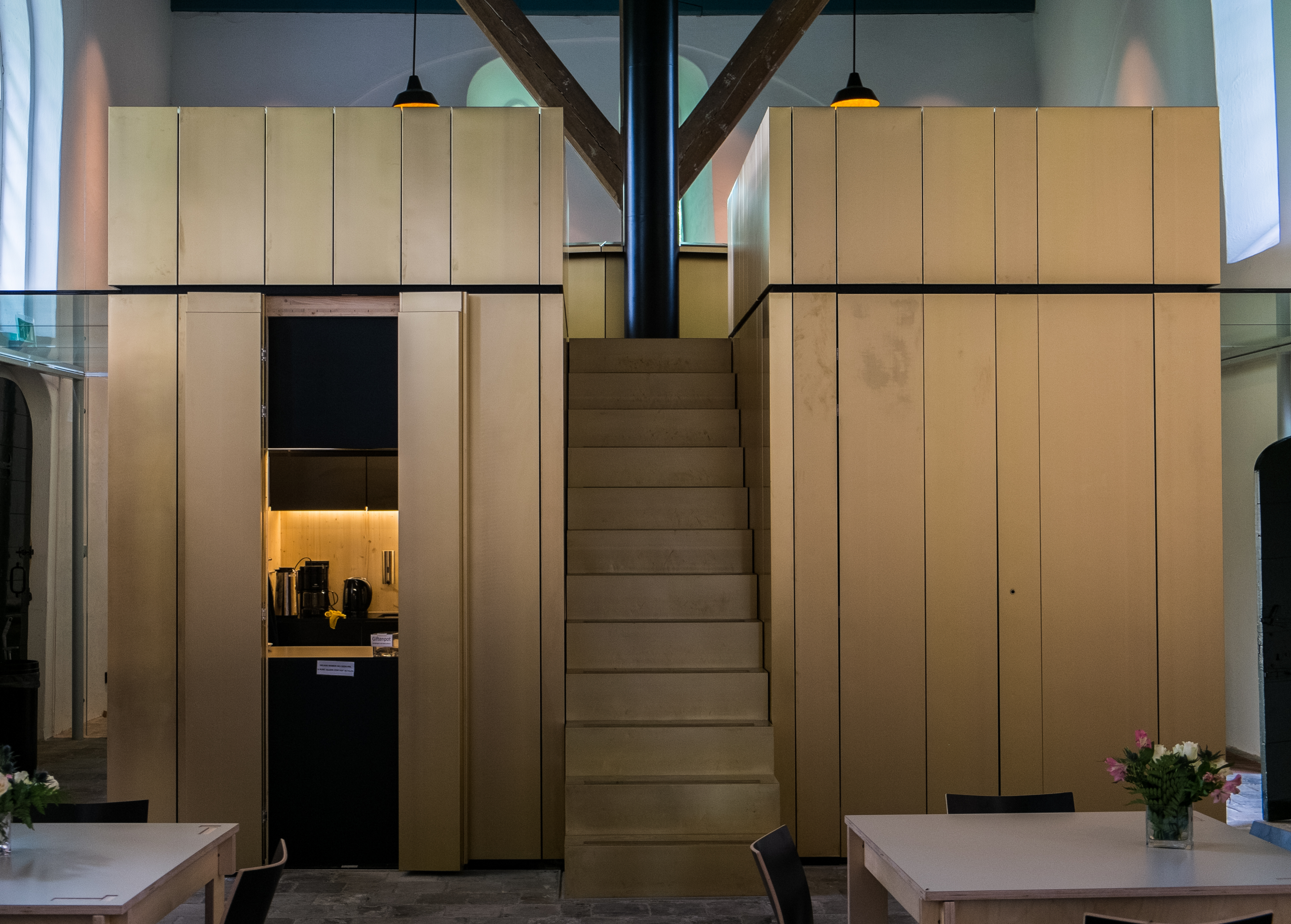 'gouden kubus' (van architect Jan Verrelst) in de kerk van Leegkerk